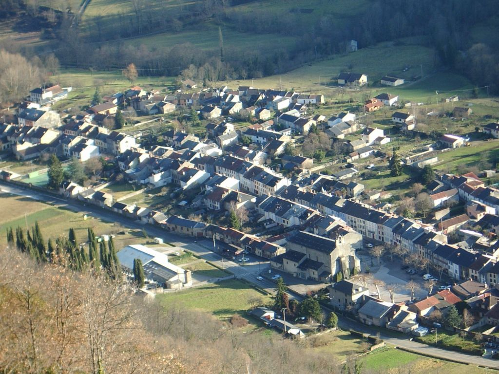 Vue du village de Saurat depuis la Rouère